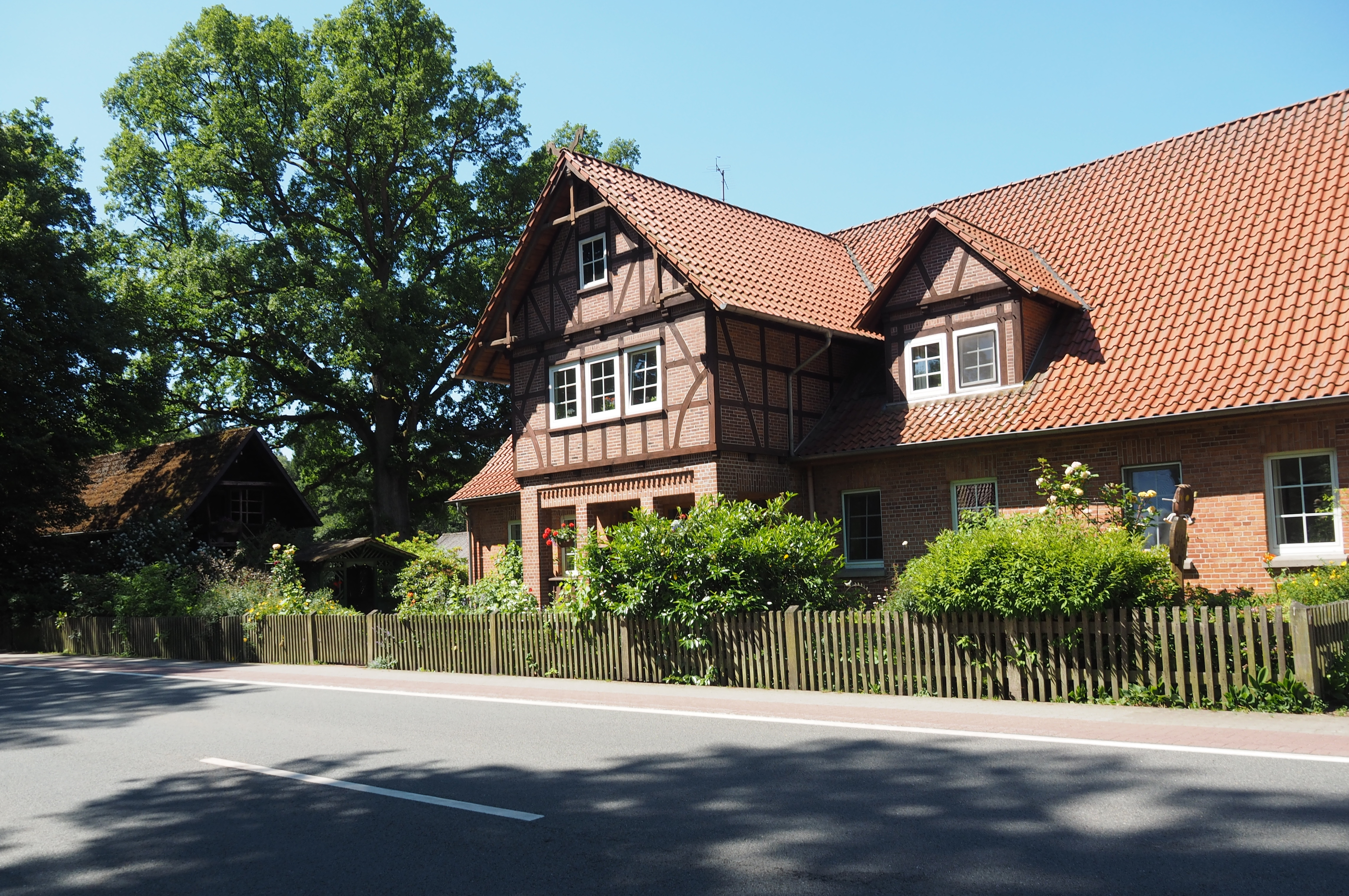 Bauerngehöft in Trauen (Kreutzen), Niedersachsen, Germany